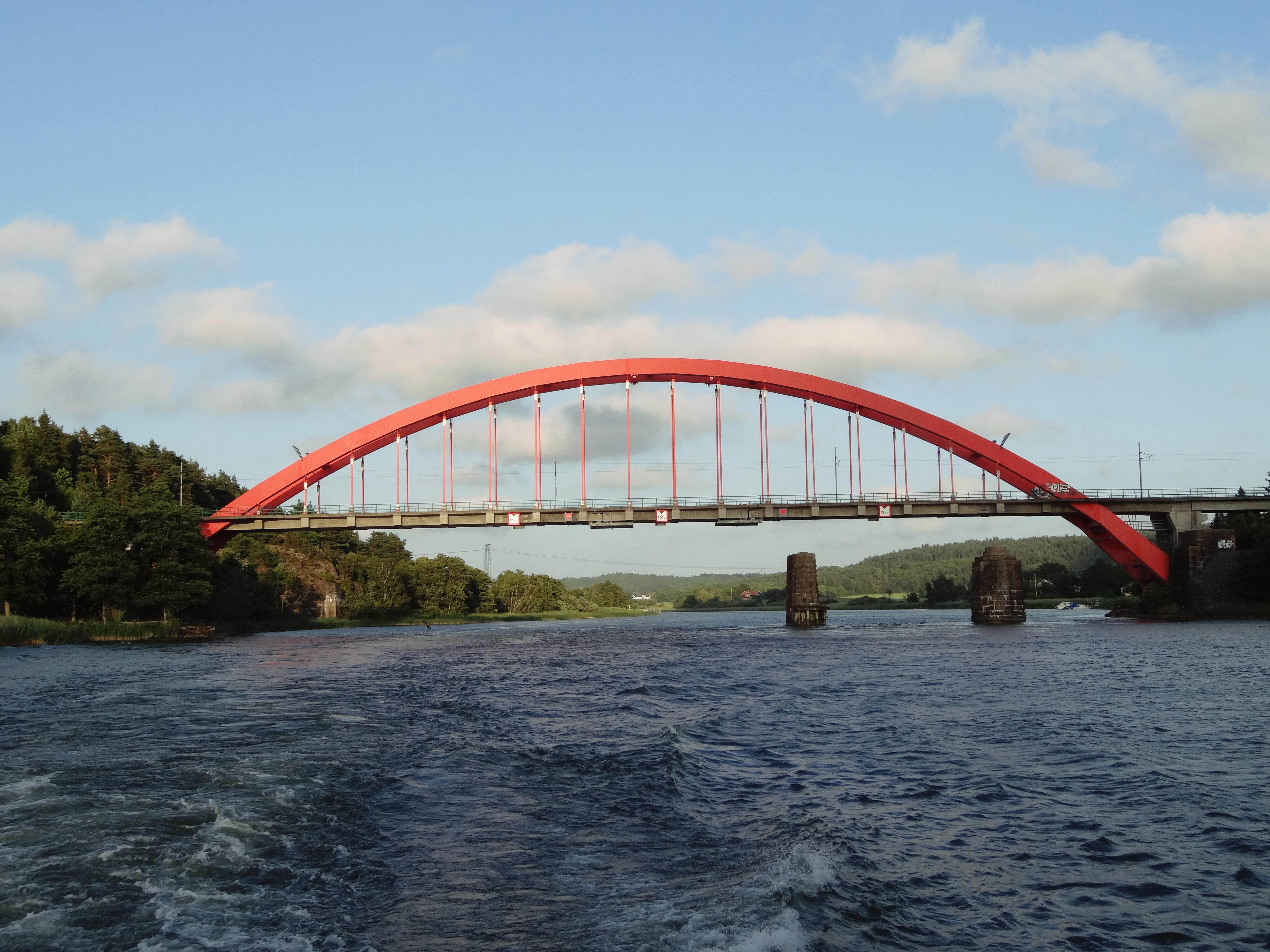 to be filled in later